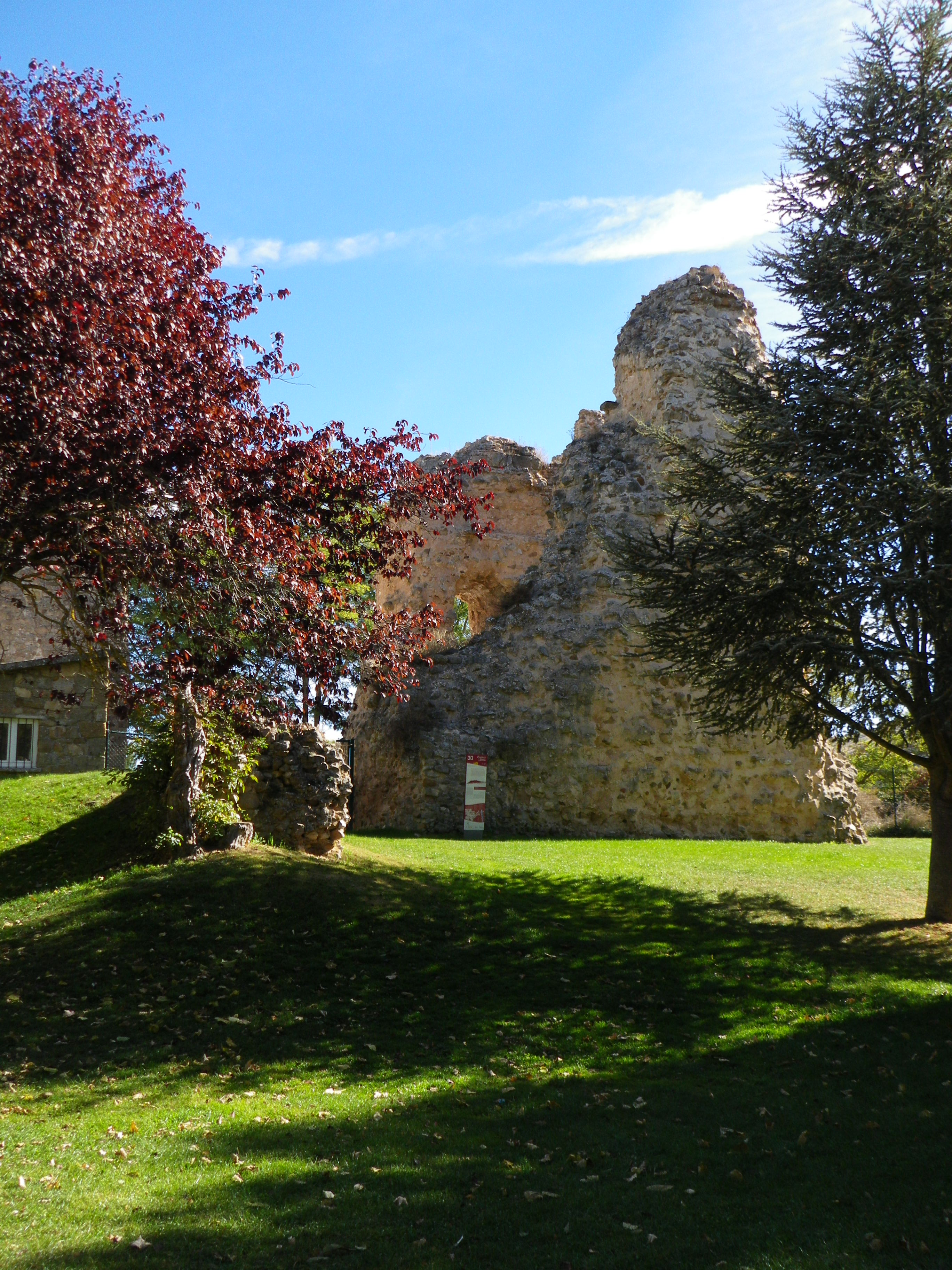 Foto de las ruinas del castillo de Soria en otoño del año 2010.